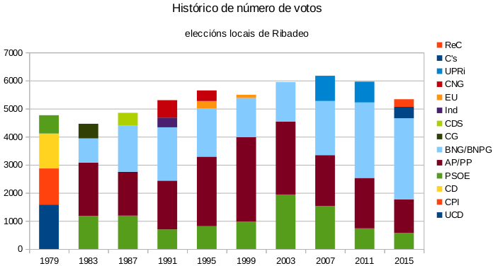 Histórico número de votos. Ribadeo